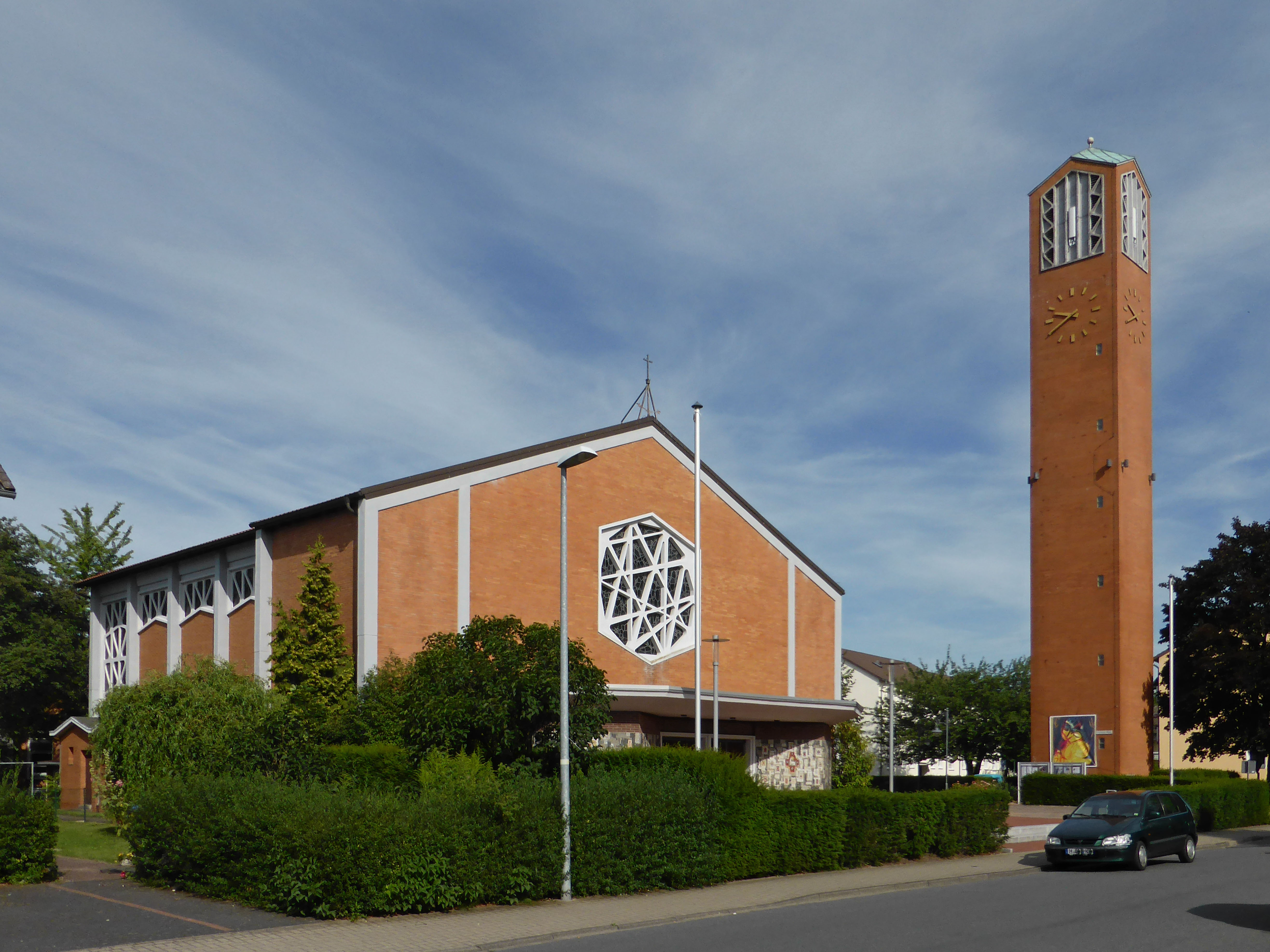 Katholische Kirche St. Peter und Paul in Neustadt am Rübenberge.